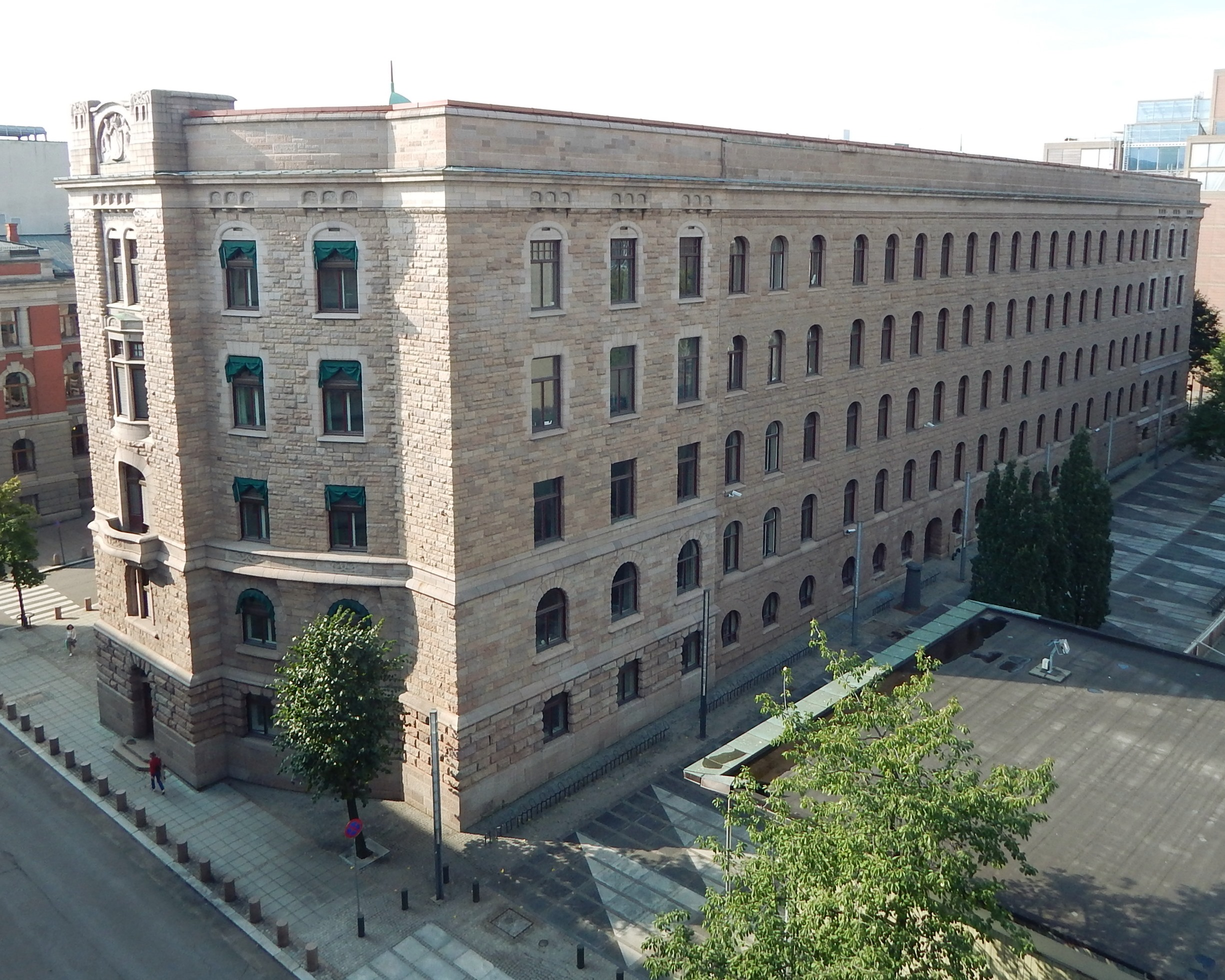 Finansdepartementet sett fra R4